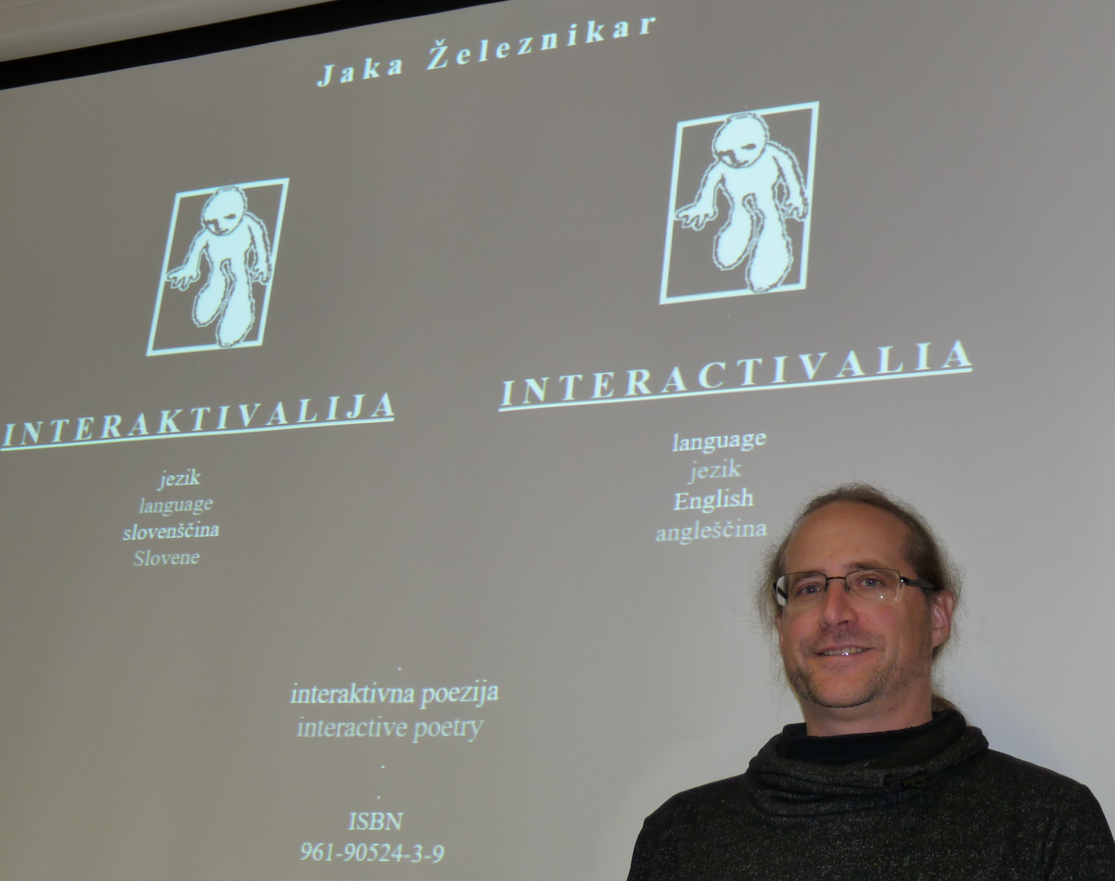 Jaka Železnikar z naslovnico svoje pesniške zbirke Interaktivalija